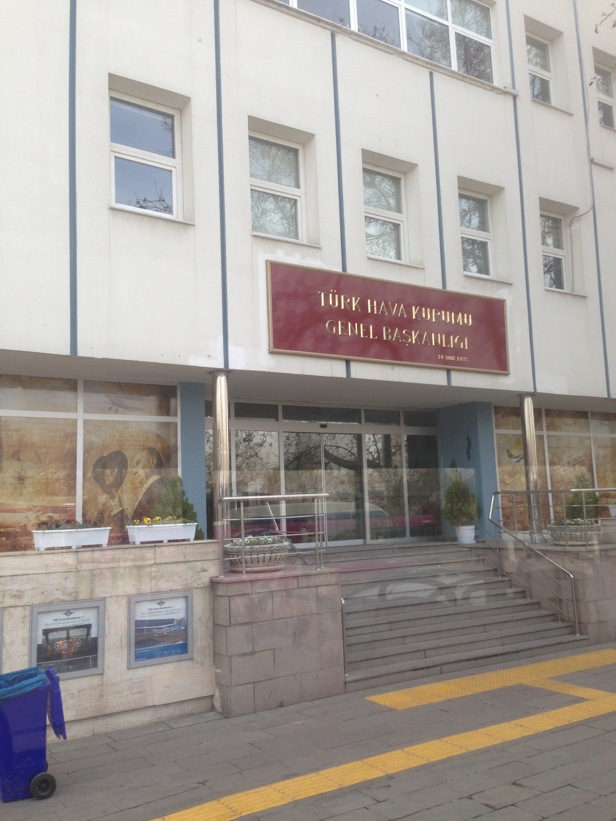 Türk Hava Kurumu